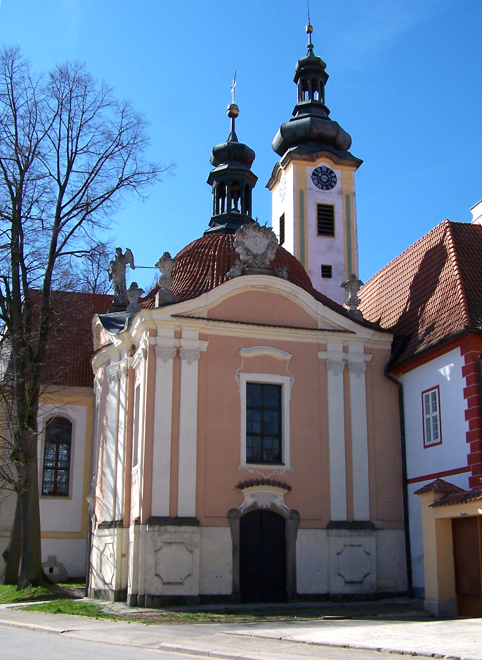 Kostel Navštívení Panny Marie v Borovanech, okres České Budějovice